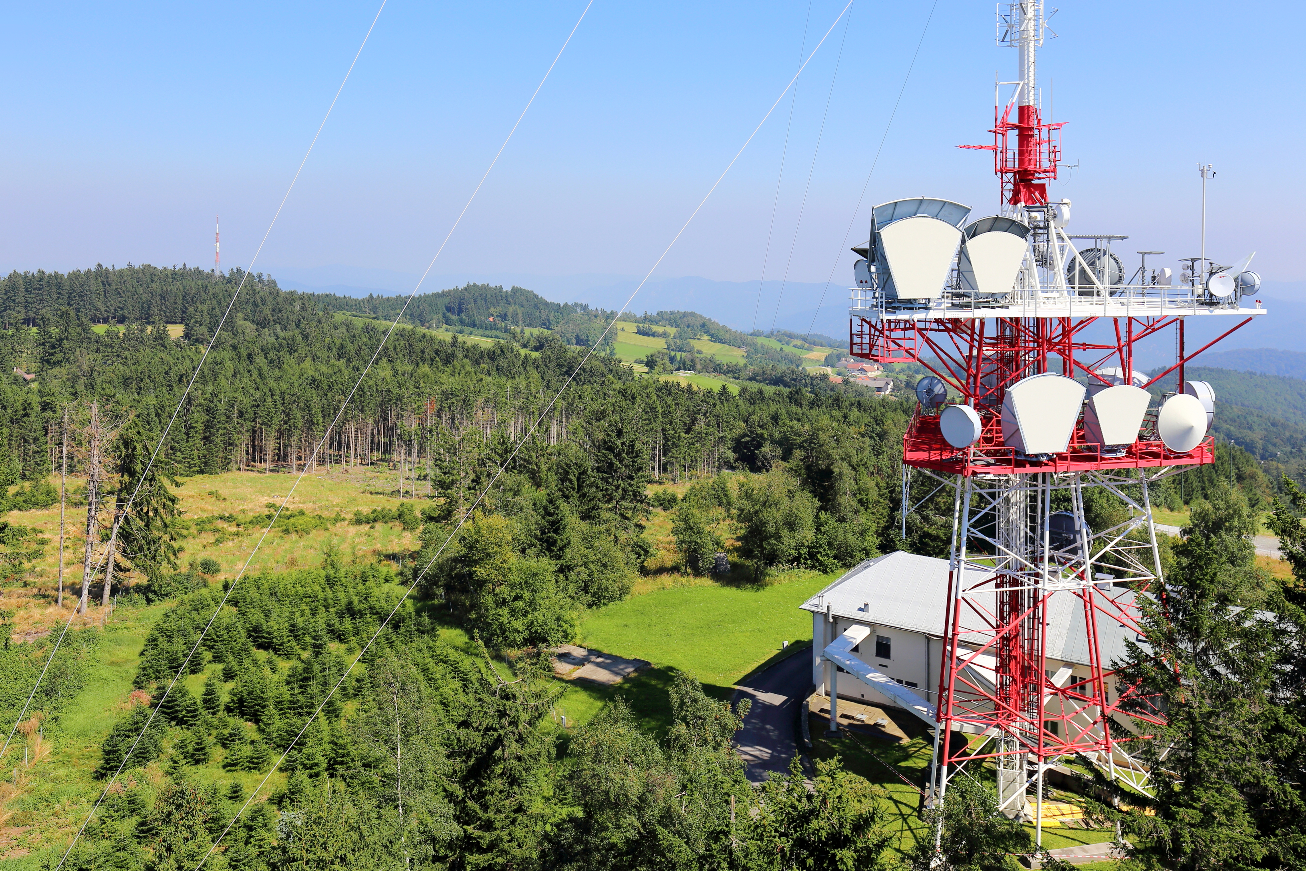 Blick von der Jauerling-Aussichtswarte Richtung Nordosten über das Jauerling-Plateau in Maria Laach am Jauerling, eine niederösterreichische Marktgemeinde in der Wachau.Die 38 m hohen Aussichtwarte befindet sich auf dem 960 m hohen "Südgipfel" des Jauerlings und wurde von 1987 bis 1991 errichtet. Rechts die 141 m hohe Großsendeanlage St.Pölten-Jauerling, die auf einer Höhe von 952 m ab 1955 errichtet und 1958 offiziell eröffnet wurde. Links hinten ein weiterer Sender, der als Relaisstation u.a. für Feuerwehr und Polizei dient. Vor diesem Sender und wiederum etwas links befindet sich der eigentliche/offizielle Gipfel (lt. Austria-Map-online des Bundesamtes für Eich- und Vermessungswesen und rd. 500 m nördlich des "Südgipfels") des 960 m hohen Jauerlings auf dem 1866 eine steinerne Pyramide für die Mitteleuropäische Gradmessung errichtet wurde. Das Gebiet um dem Jauerling und das zur östlich gelegenen Donau hin wird als Naturpark Jauerling-Wachau geschützt und vermarktet und umfasst die sieben Gemeindegebiete: Aggsbach Markt, Emmersdorf, Maria Laach, Mühldorf, Raxendorf, Spitz an der Donau und Weiten.